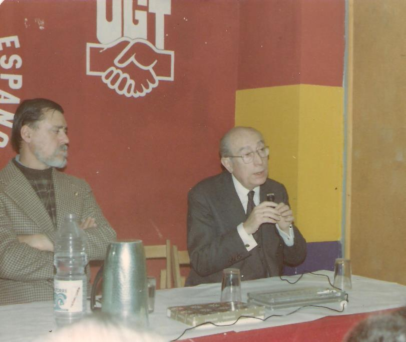 José Antonio García-Blanco Peinador con Enrique Tierno Galván en 1978 en un acto político en la Agrupación Socialista de Hortaleza.